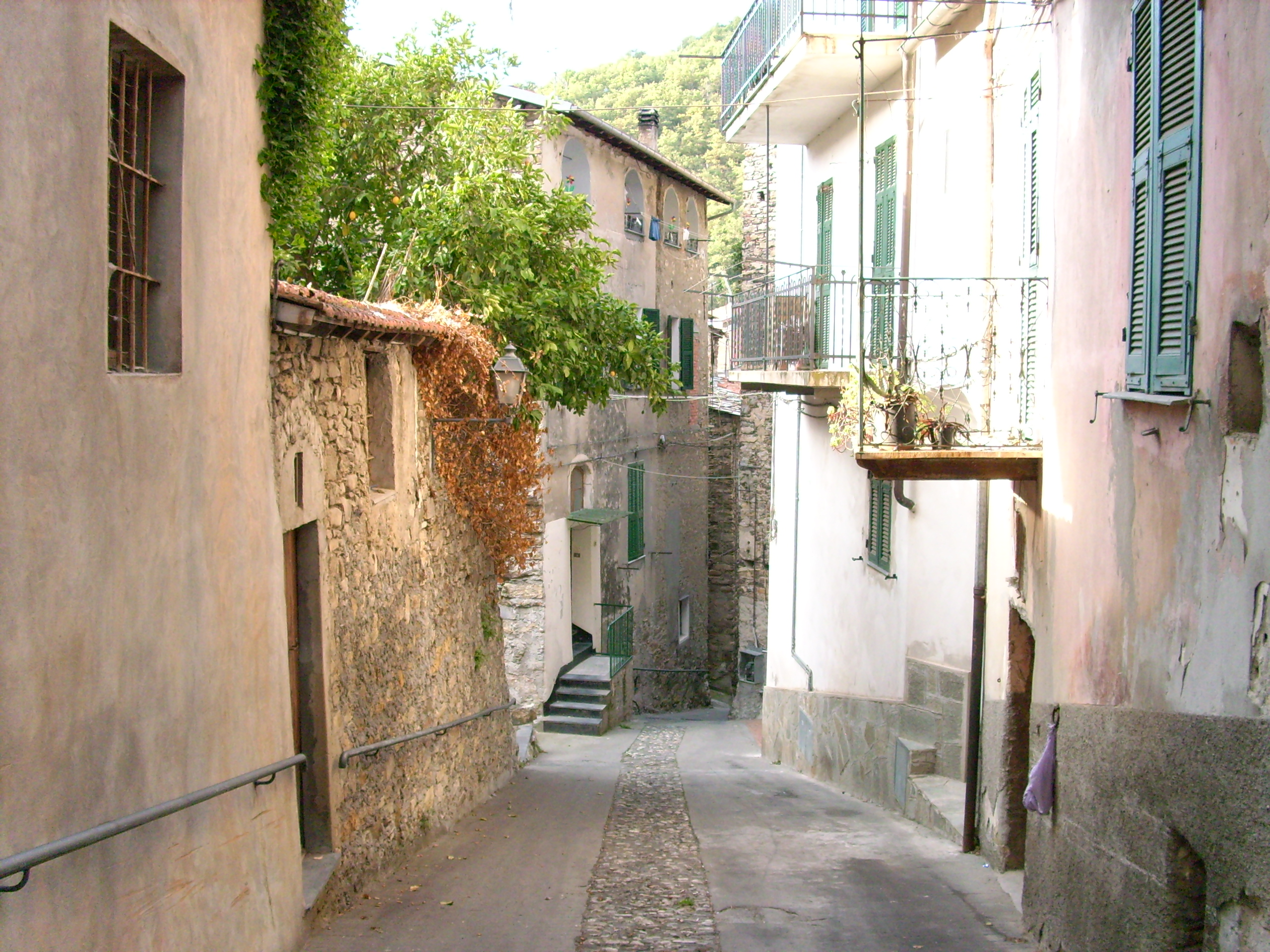 Pontedassio, Liguria, Italia